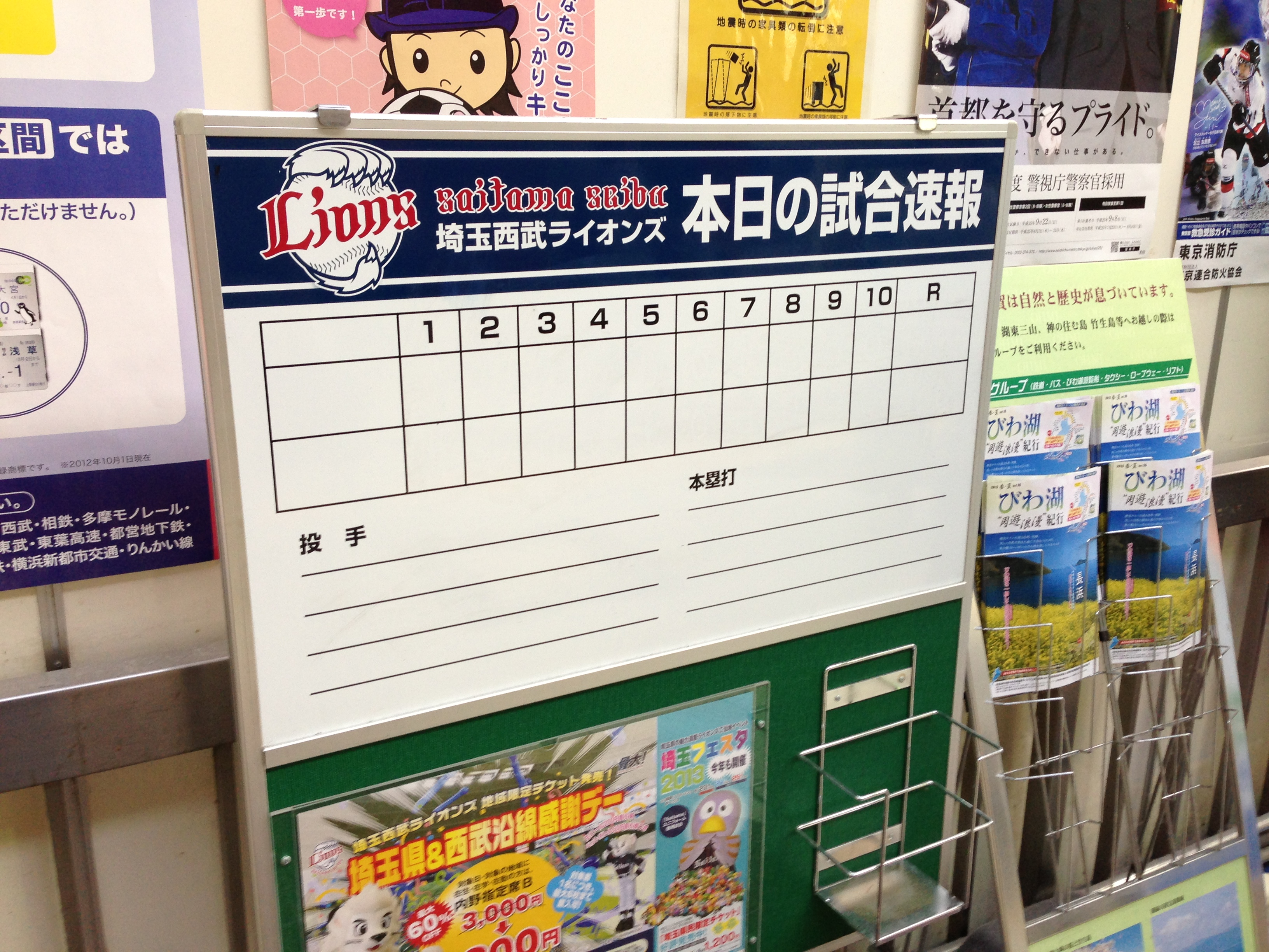 西武鉄道 国分寺駅